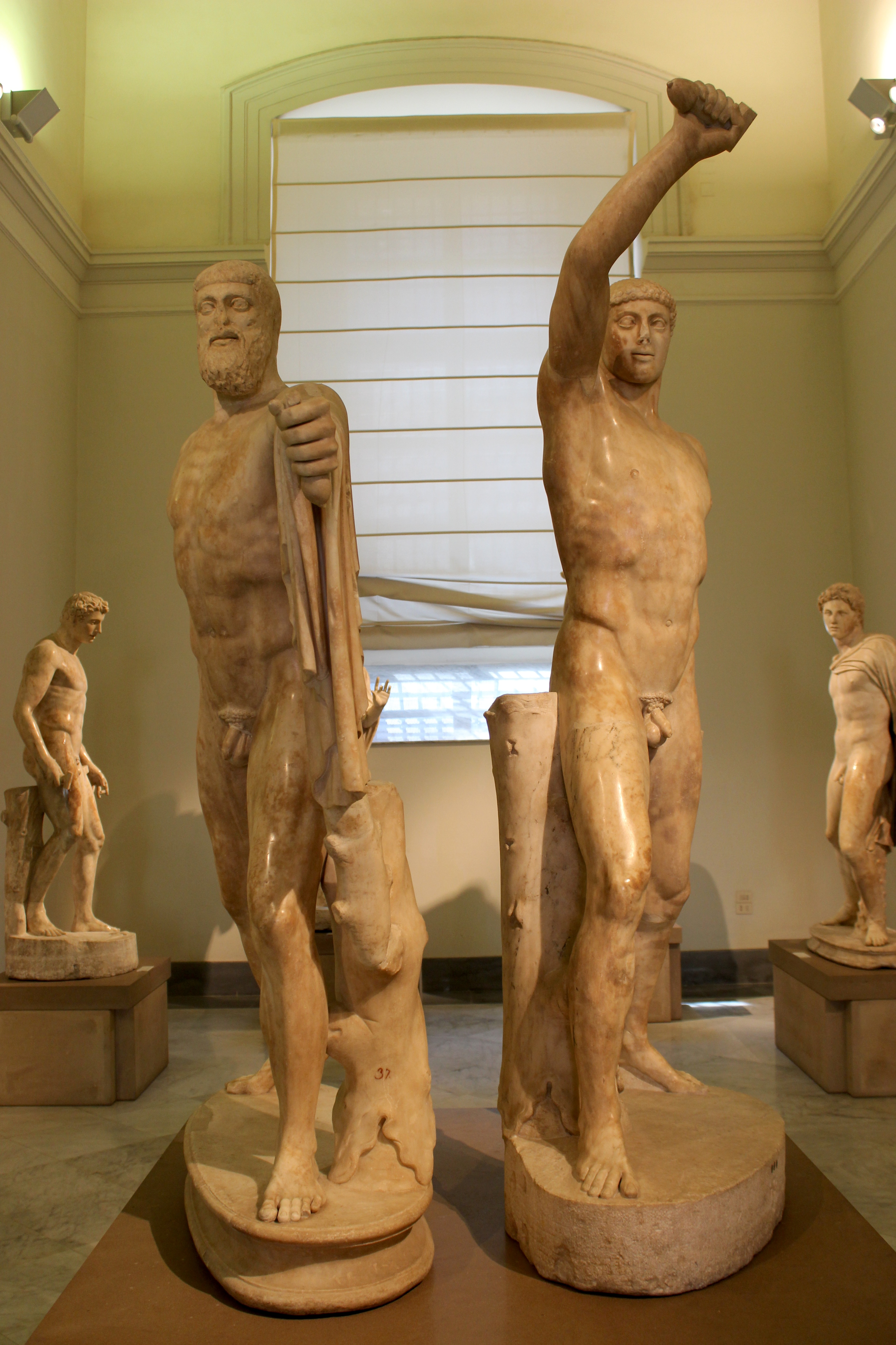 Nápoles. Museo Archeologico Nazionale. Harmodio y Aristogeiton.